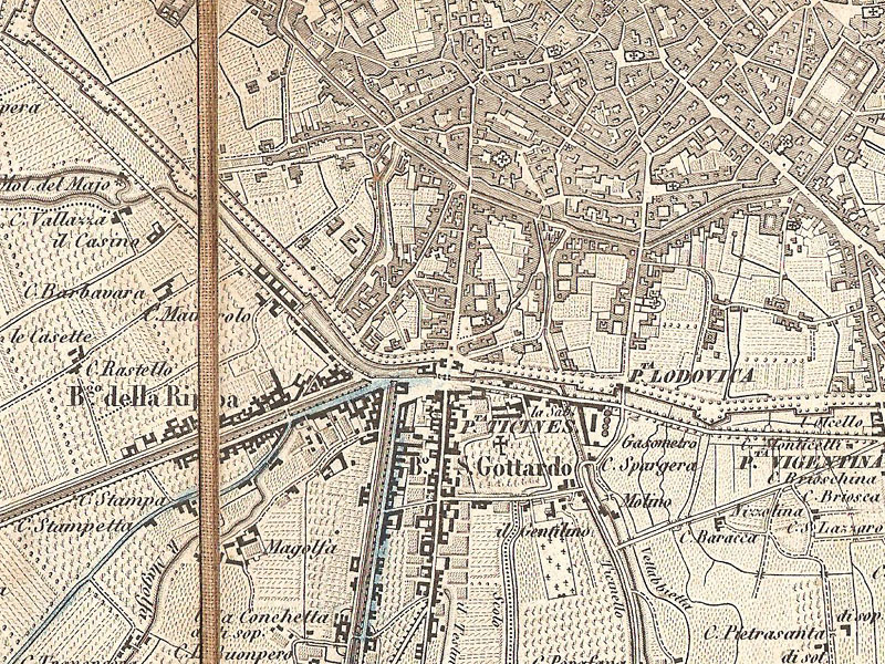 Carta di Milano, Giovanni Brenna (1865), dettaglio di Porta Ticinese